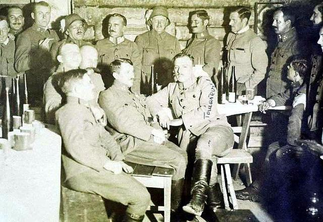 25. dom. puk, zapovjedništvo na istočnoj bojišnici, 1. svj. rat